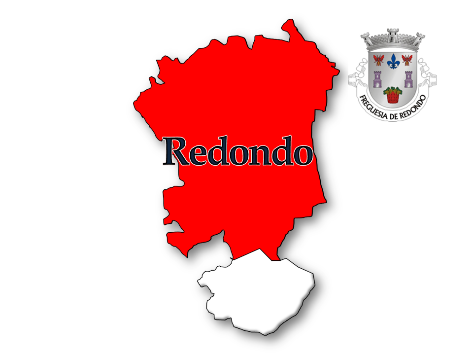 Evolução da População